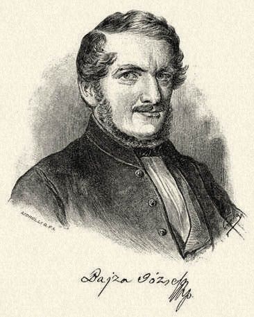 Bajza József (1804–1858) költő, színiigazgató, kritikus. Morelli Gusztáv fametszete. Megjelent Az Osztrák-Magyar Monarchia írásban és képben (1887–1901) kiadványban